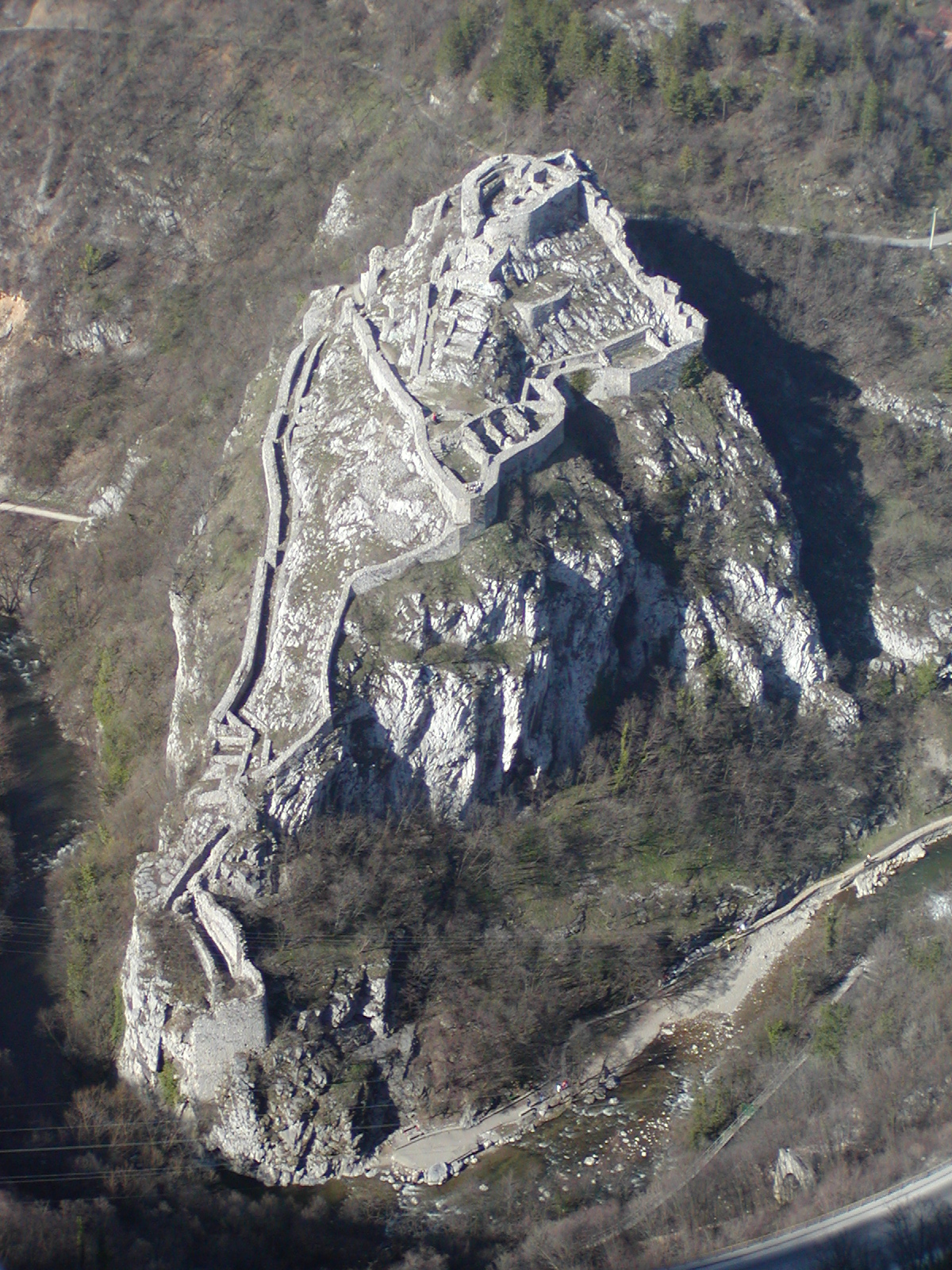 Uzice, Serbia - medieval fortress